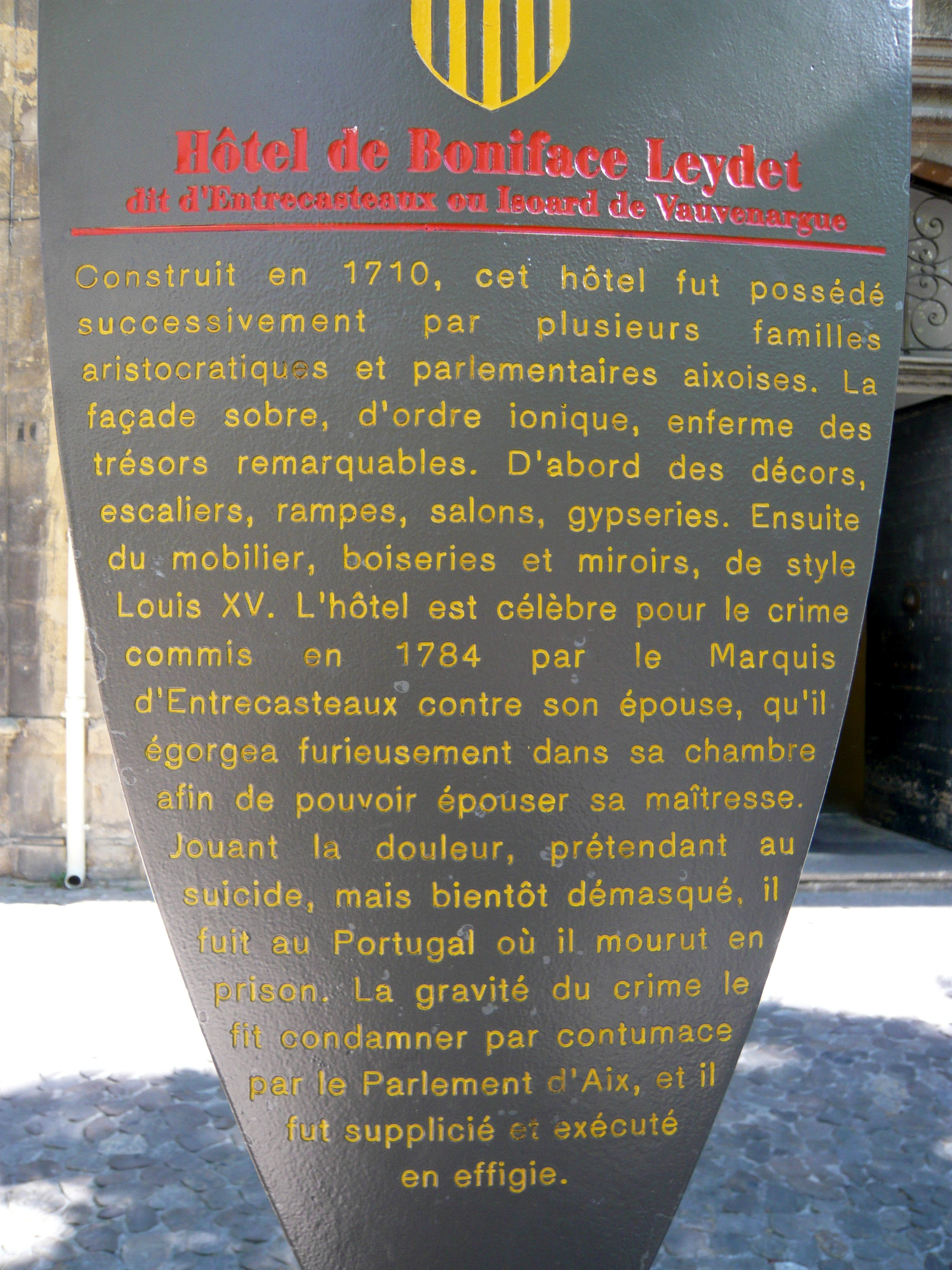 Hôtel de Boniface Leydet dit d'Entrecasteaux ou Isoard de Vauvenargues, 10 cours Mirabeau, Aix-en-Provence (France). Construit en 1710, cet hôtel fut possédé successivement par plusieurs familles aristocratiques et parlementaires aixoises. La façade sobre, d’ordre ionique, enferme des trésors remarquables. D’abord des décors, escaliers, rampes, salons, gypseries. Ensuite du mobilier, boiseries et miroirs, de style Louis XV. L’hôtel est célèbre pour le crime commis en 1784 par le Marquis d’Entrecasteaux contre son épouse, qu’il égorgea furieusement dans sa chambre, afin de pouvoir épouser sa maîtresse. Jouant la douleur, prétendant au suicide, mais bientôt démasqué, il fuit au Portugal où il mourut en prison. La gravité du crime le fit condamner par contumace par le Parlement d’Aix, et il fut supplicié et exécuté en effigie.